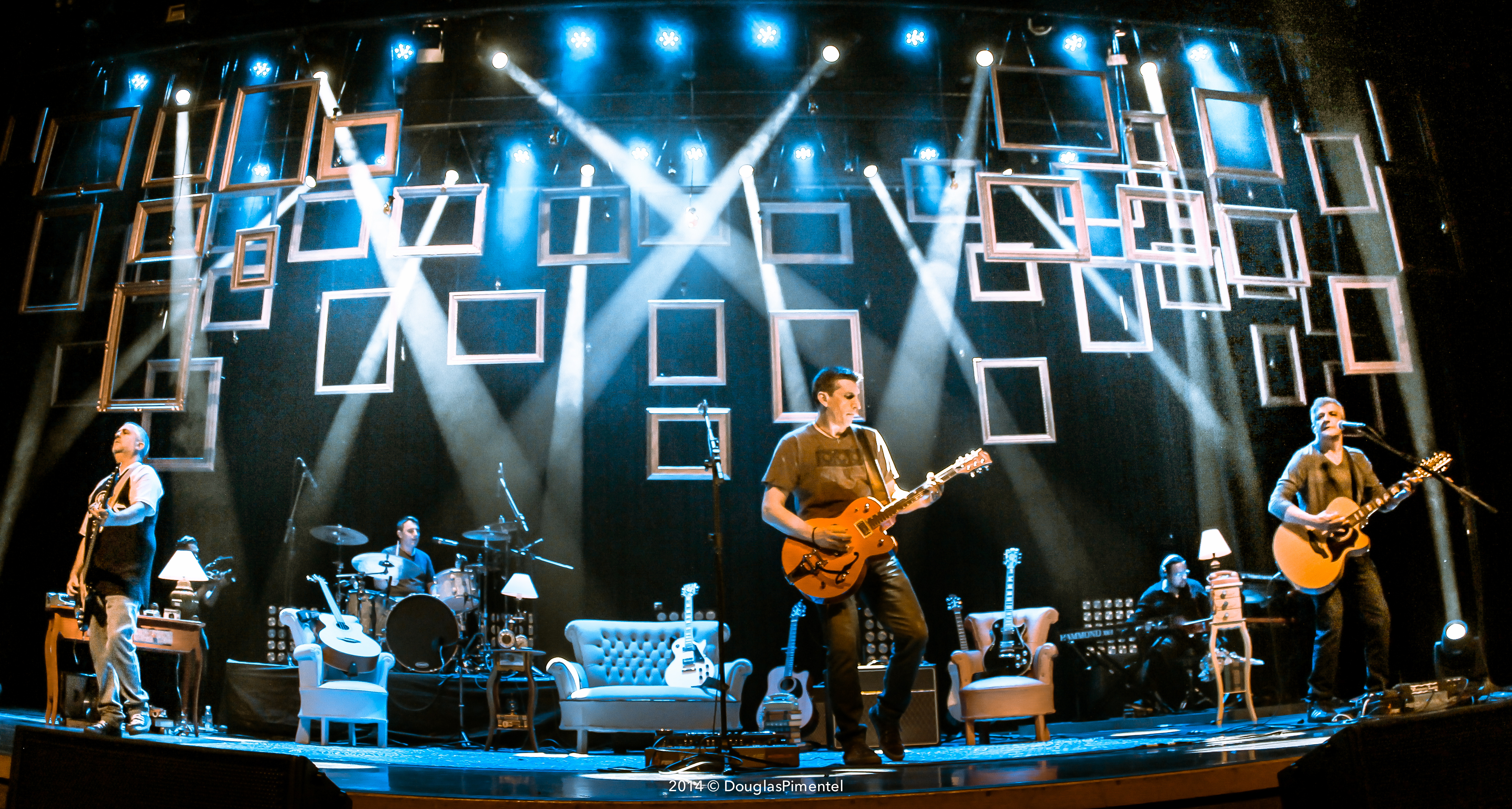 Resgate na gravação do DVD de 25 Anos.